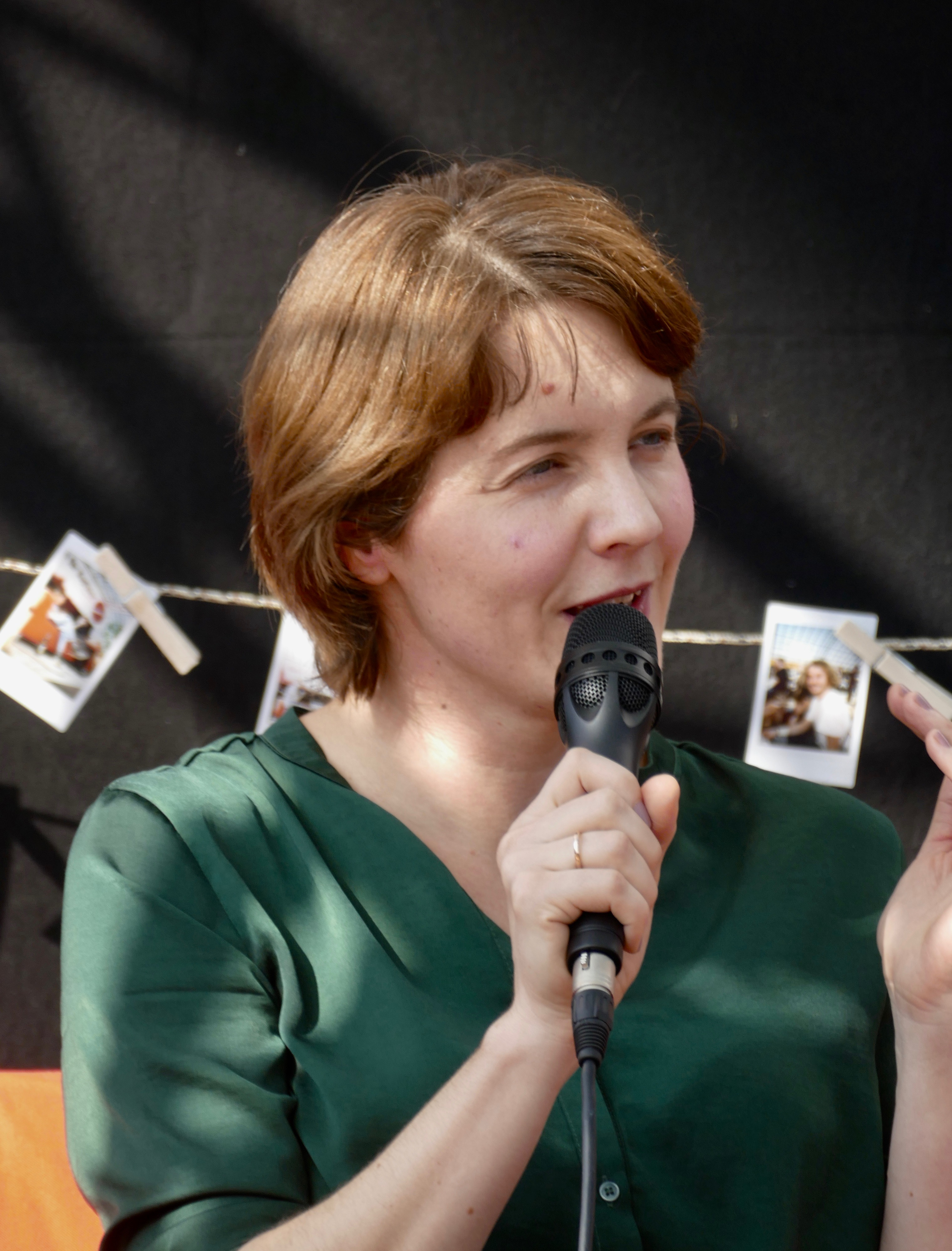 Peggy Mädler auf der Leipziger Buchmesse 2019. Sie stellt ihren Roman "Wohin wir gehen" (Galvani) vor.